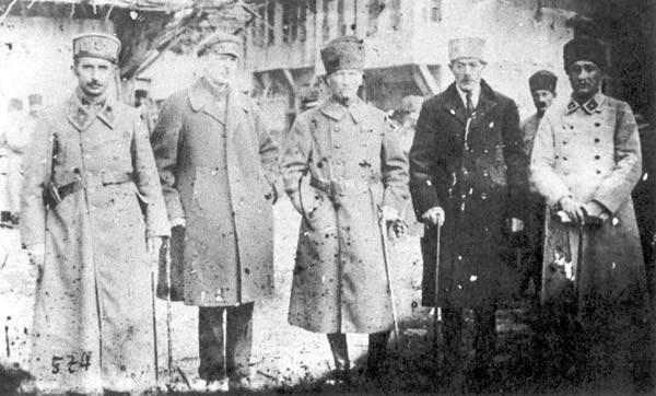 Mustafa Kamal paşa, İbrahim Əbilov və Rusiyanın Türkiyədəki ticarət nümayəndəsi S. Aralov